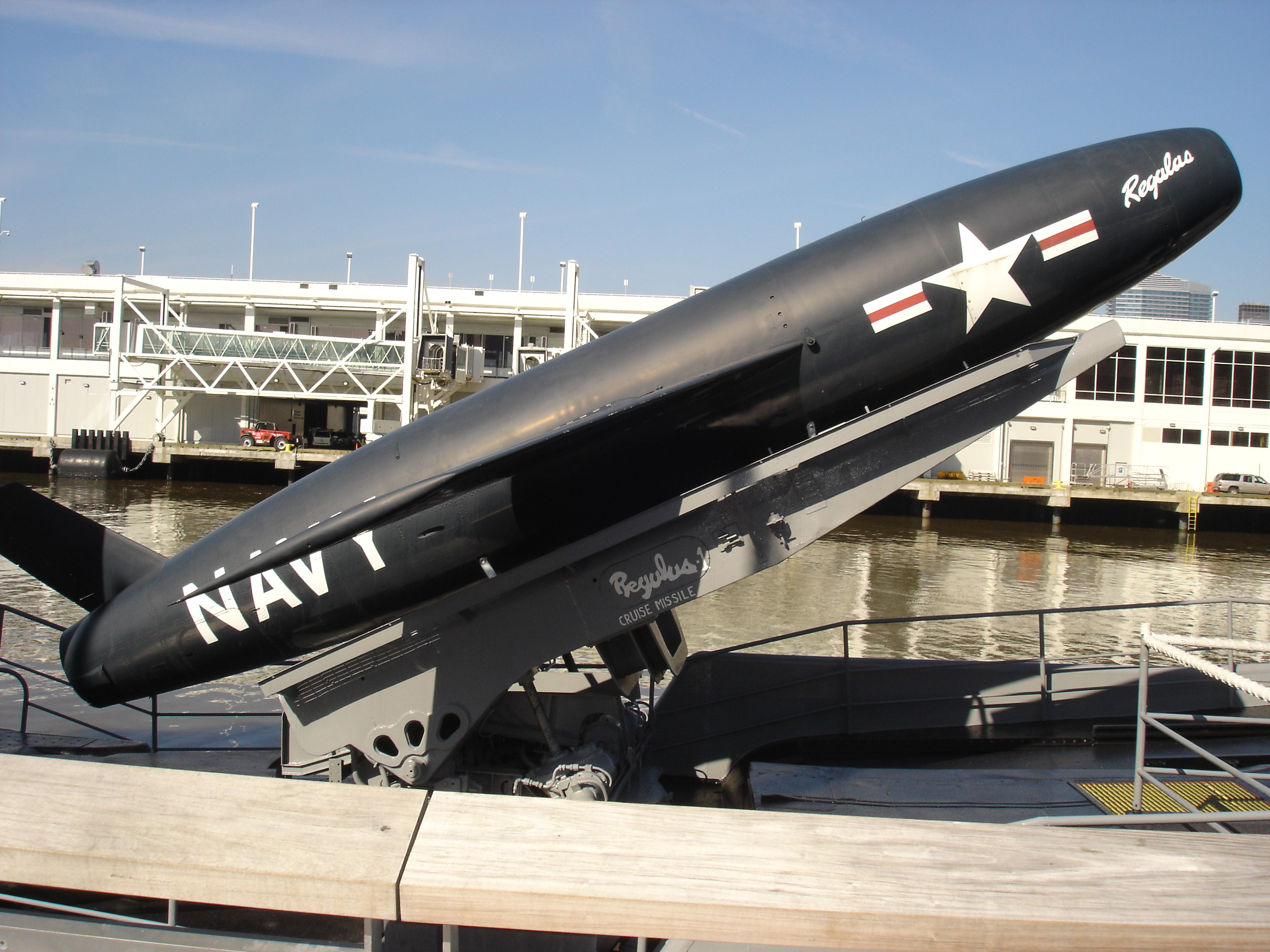 Misil Regulus en posición de lanzamiento en el submarino USS Growler.